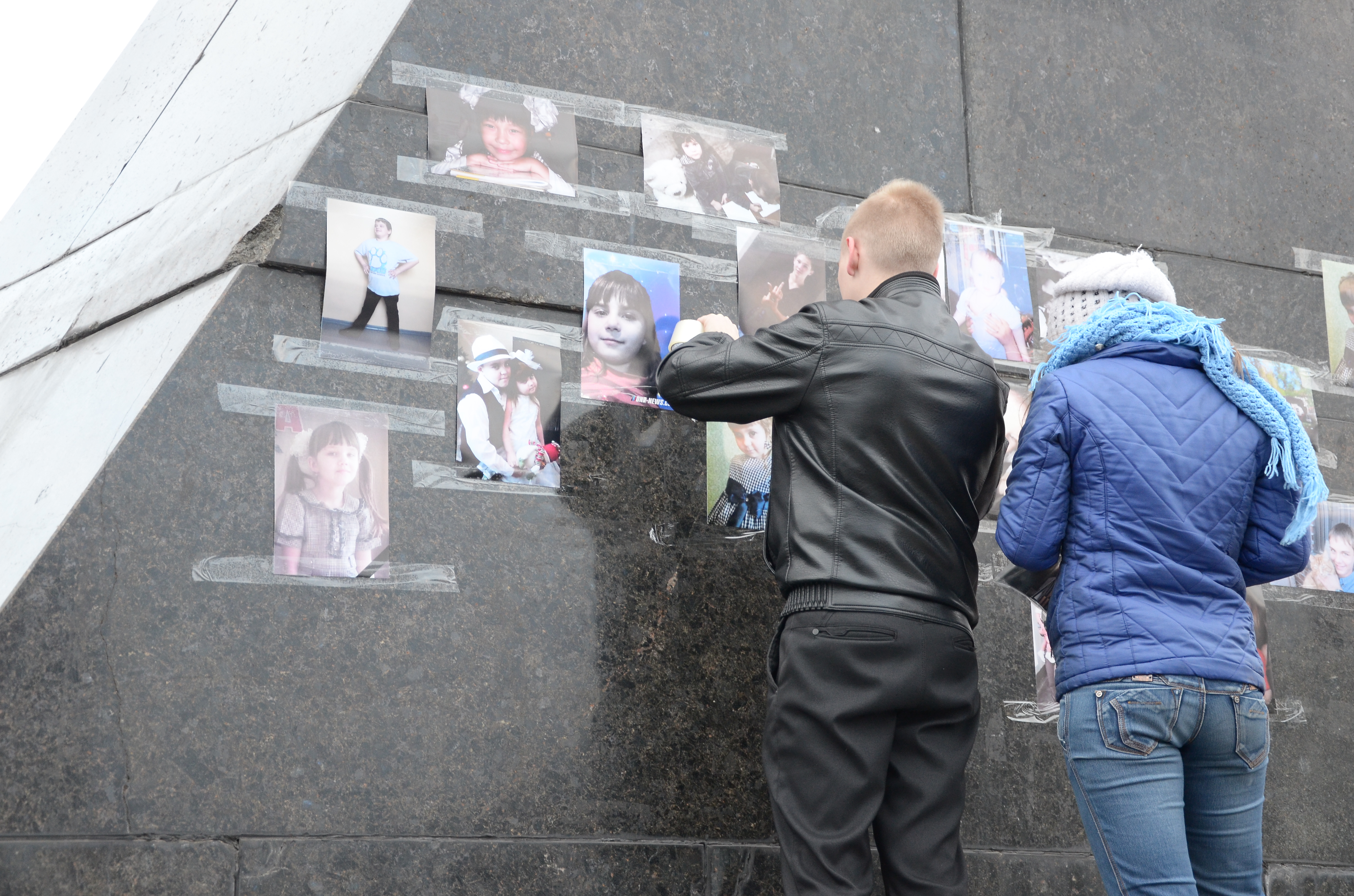 Донецк. Площадь Ленина. Вечер-реквием по погибшим детям Донбасса